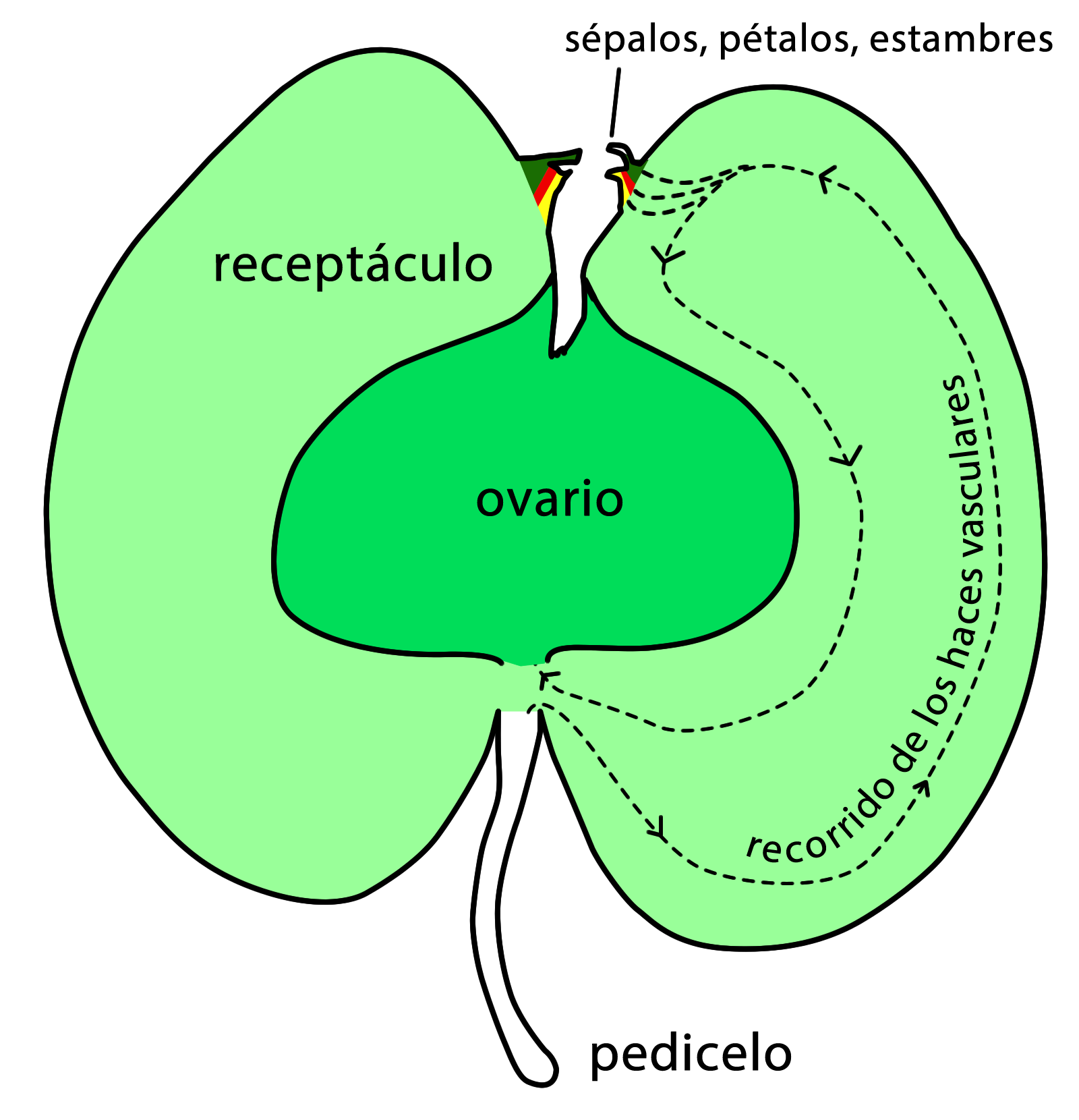 Fruto de Malus, diagrama.